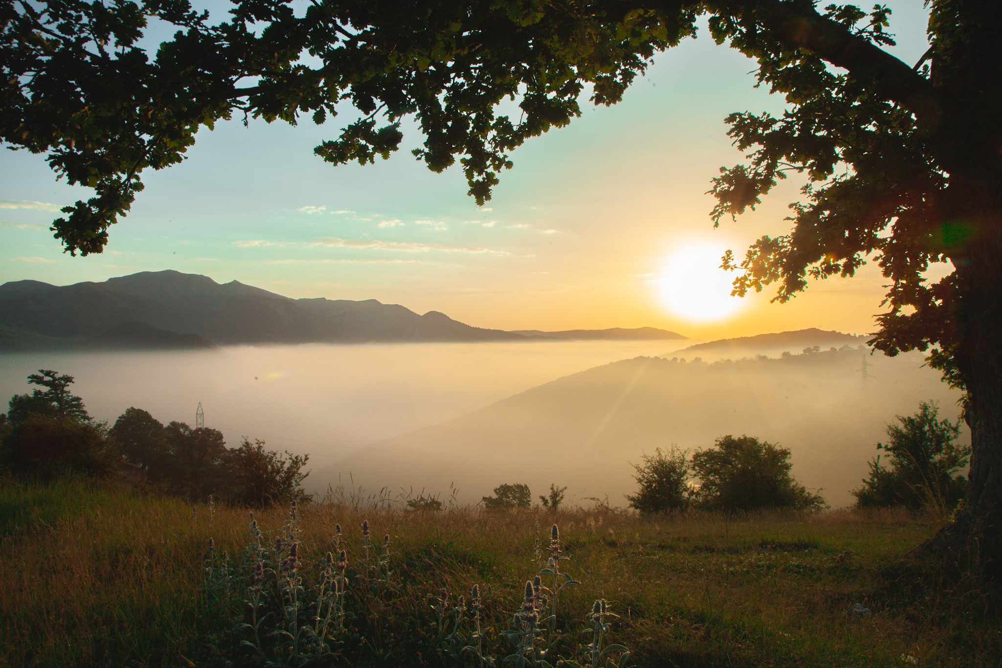 این عکس توسط پوریا افخمی ثبت شده است.